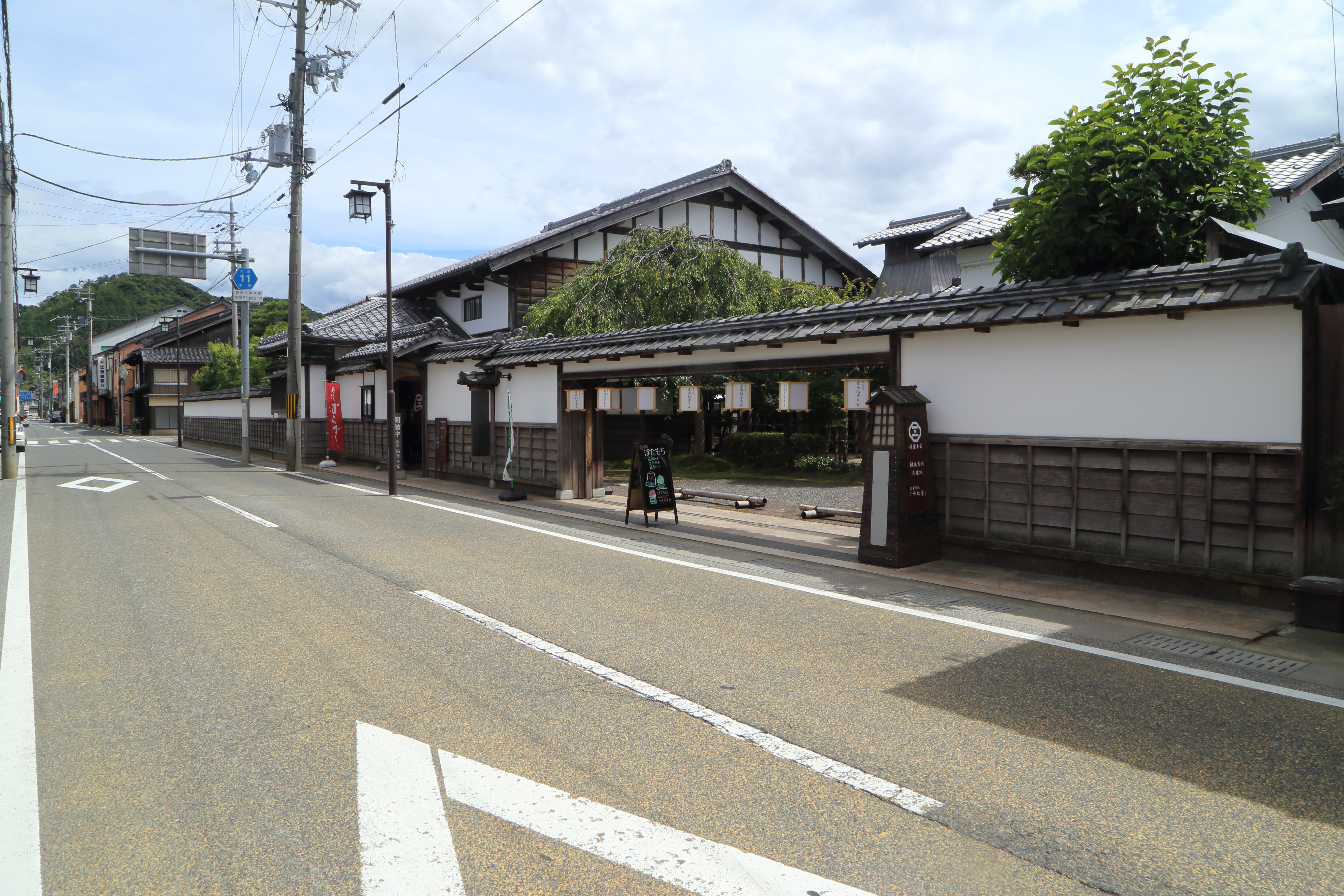 豪商稲葉本家の外観。京都府道11号沿いに建つ。